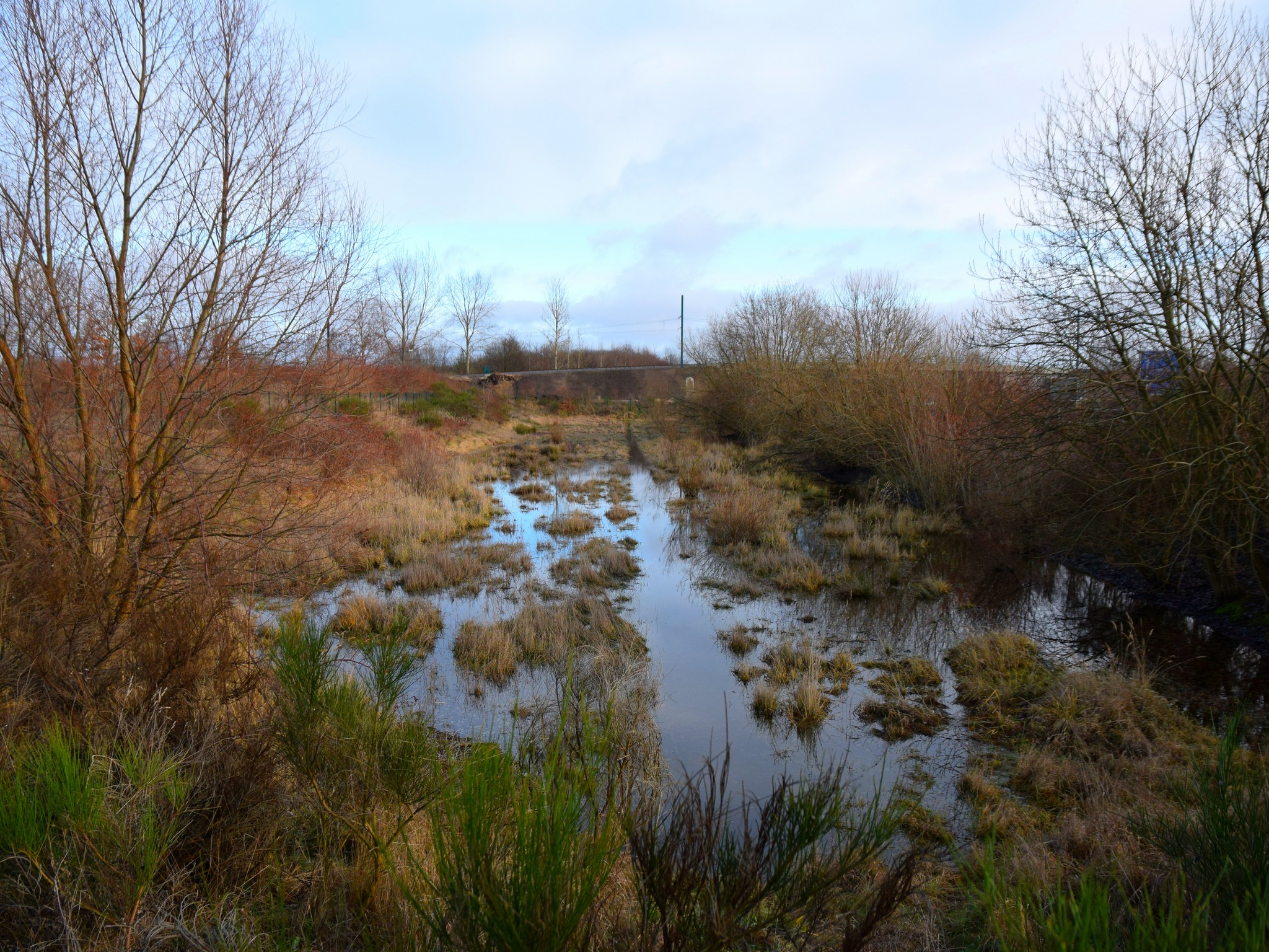 Löschteich Frankfurt (Oder)-Markendorf